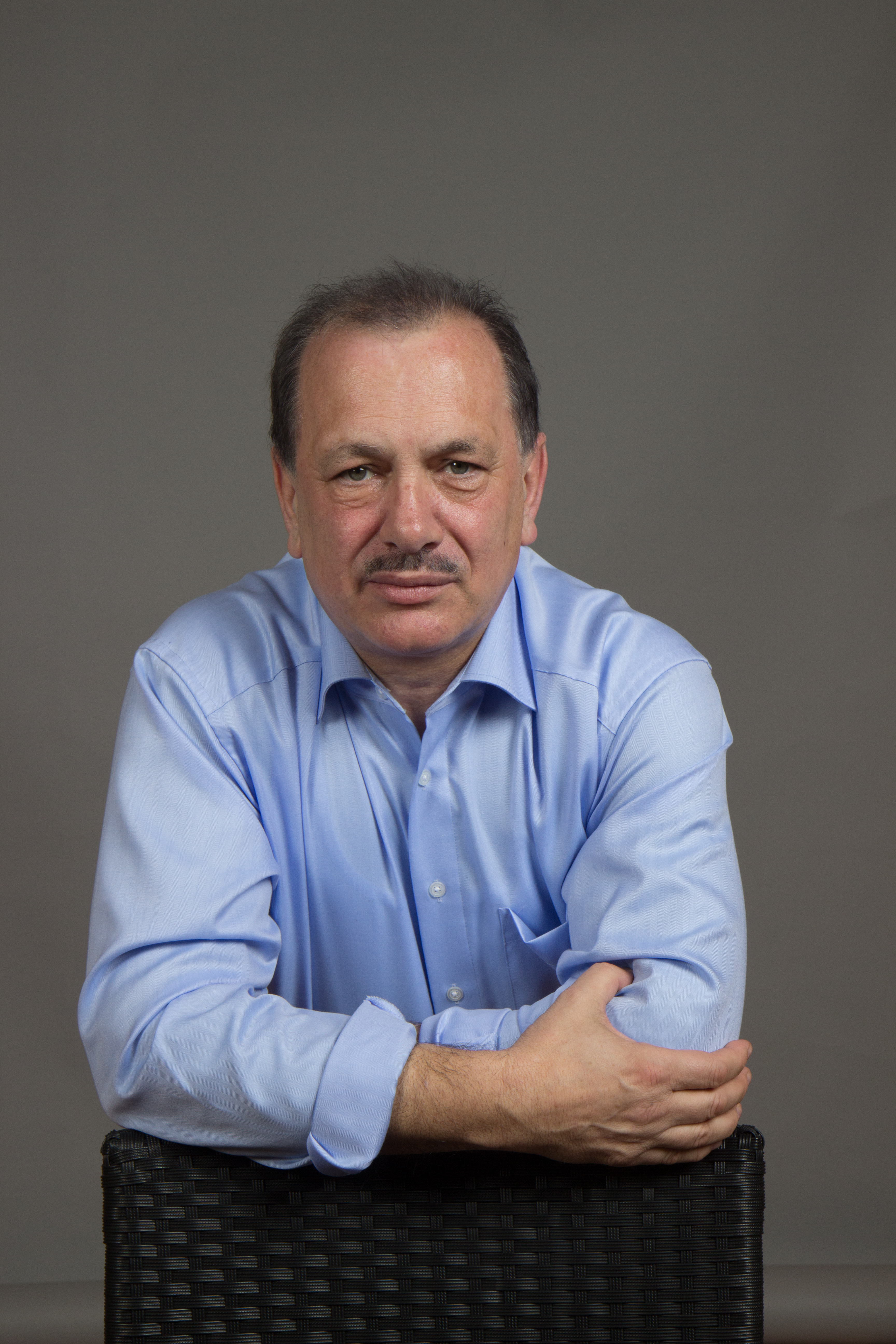 Hans Jürgen Noss, Abgeordneter des Landtags von Rheinland-Pfalz